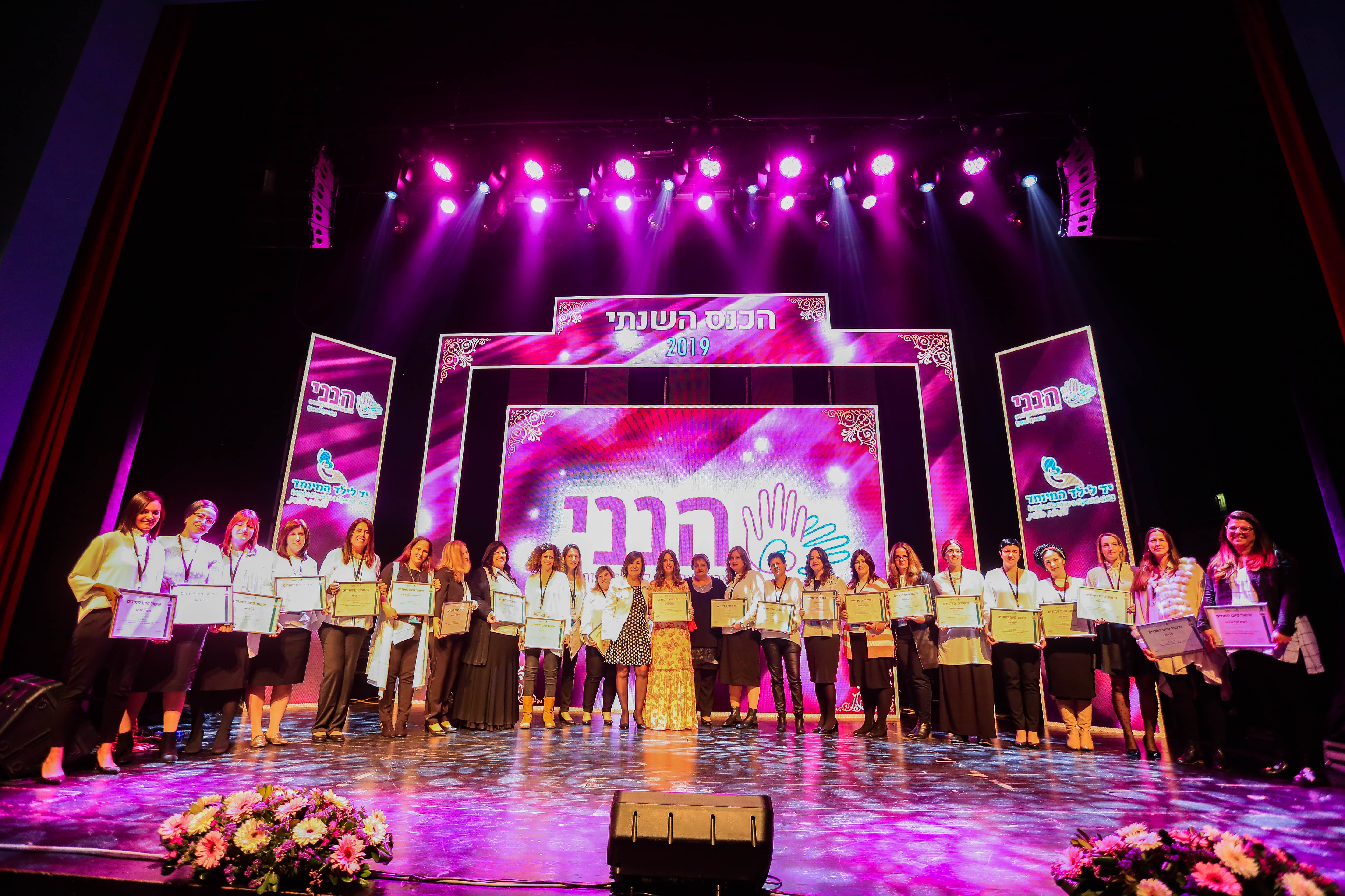 אירוע סיום ארגון הנני 2019